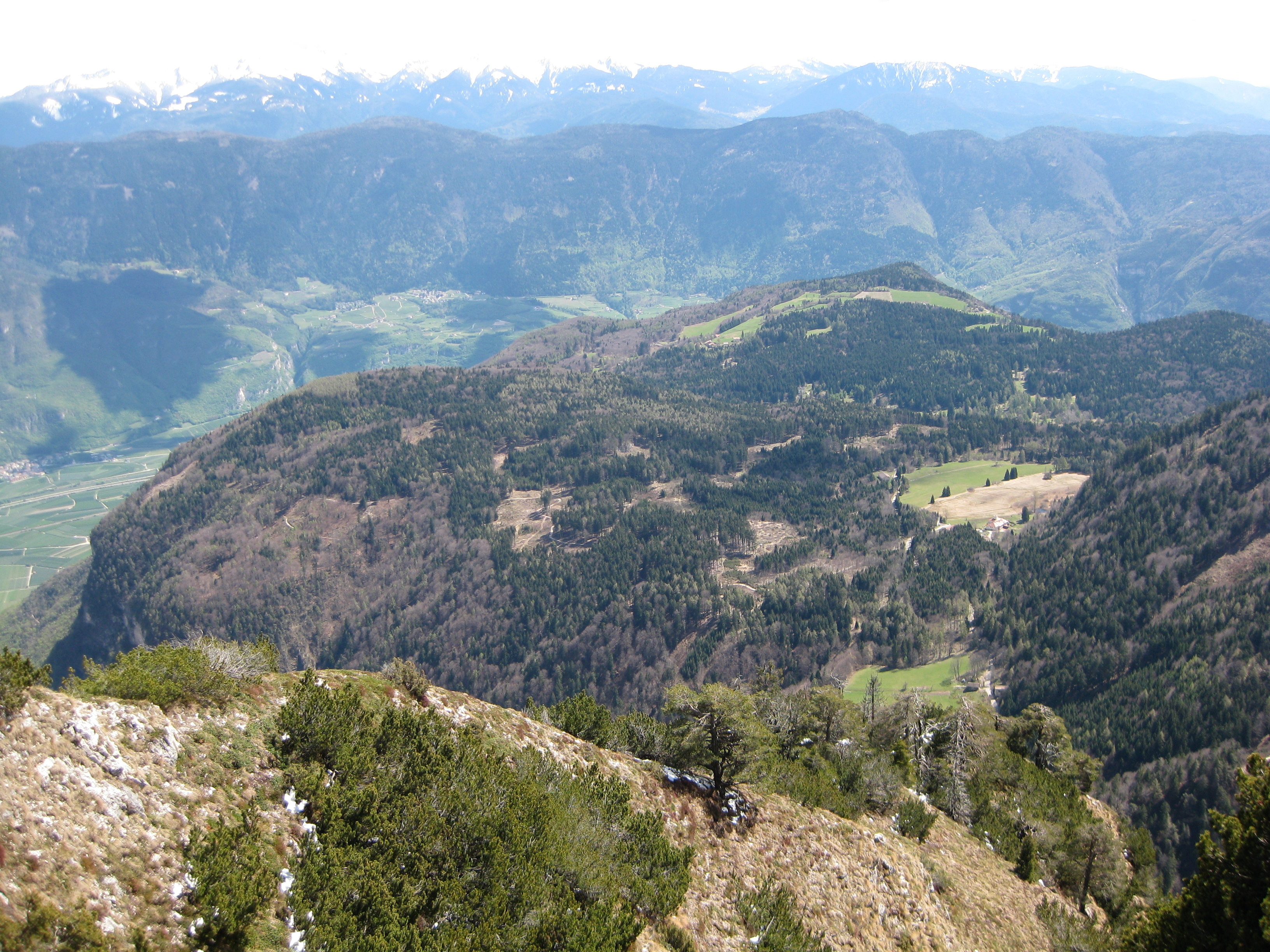 Das Hochplateau des Fennbergs aus der Höhe vom Tresner Horn aus gesehen